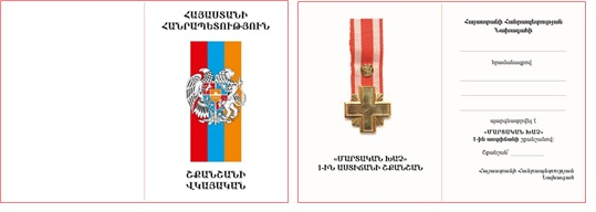 ՀՀ I աստիճանի «Մարտական խաչ» շքանշանի վկայական